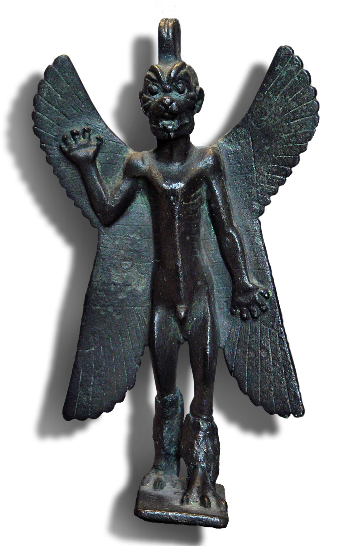 Assyrian demon Pazuzu, 1st millenium BCE.